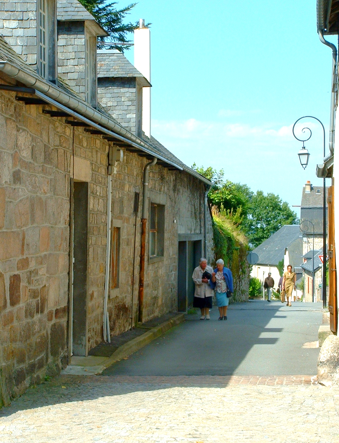 Égletons, Corrèze 2007.